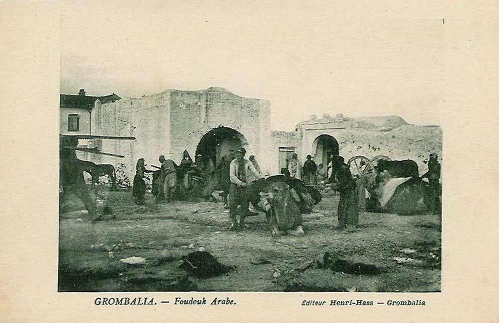 Fondouk (une sorte d'hôtel arabe) à Grombalia, Tunisie